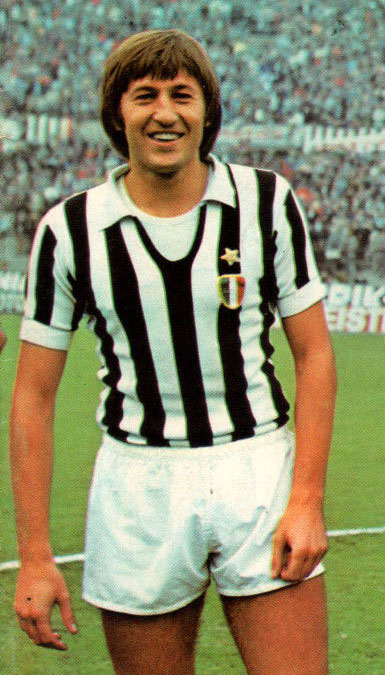 Il calciatore italiano Gianpietro Marchetti alla Juventus nella stagione 1973-74, prima dell'inizio di una partita allo stadio Comunale di Torino.